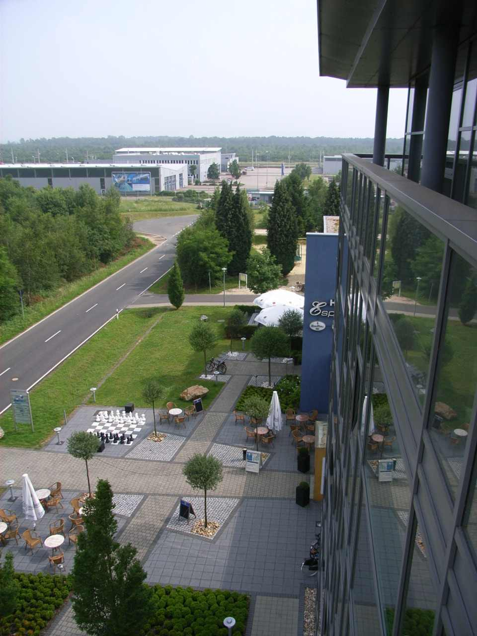 Blick vom Listzentrum auf das Siemens Prüfcenter Wildenrath